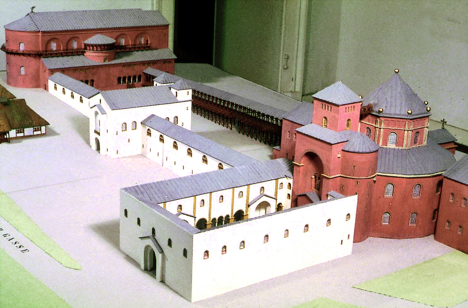 Pfalzmodell nach Leo Hugot 1981 Rekonstruktion der karolingischen Königshalle mit Verbindungsbauten zur Pfalzkapelle und Atrium